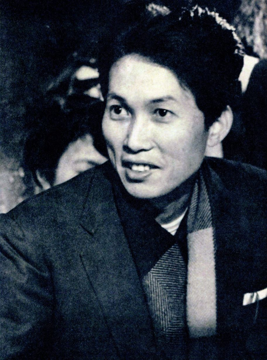 キネマ旬報社『キネマ旬報』第407号(1966)より熊井啓